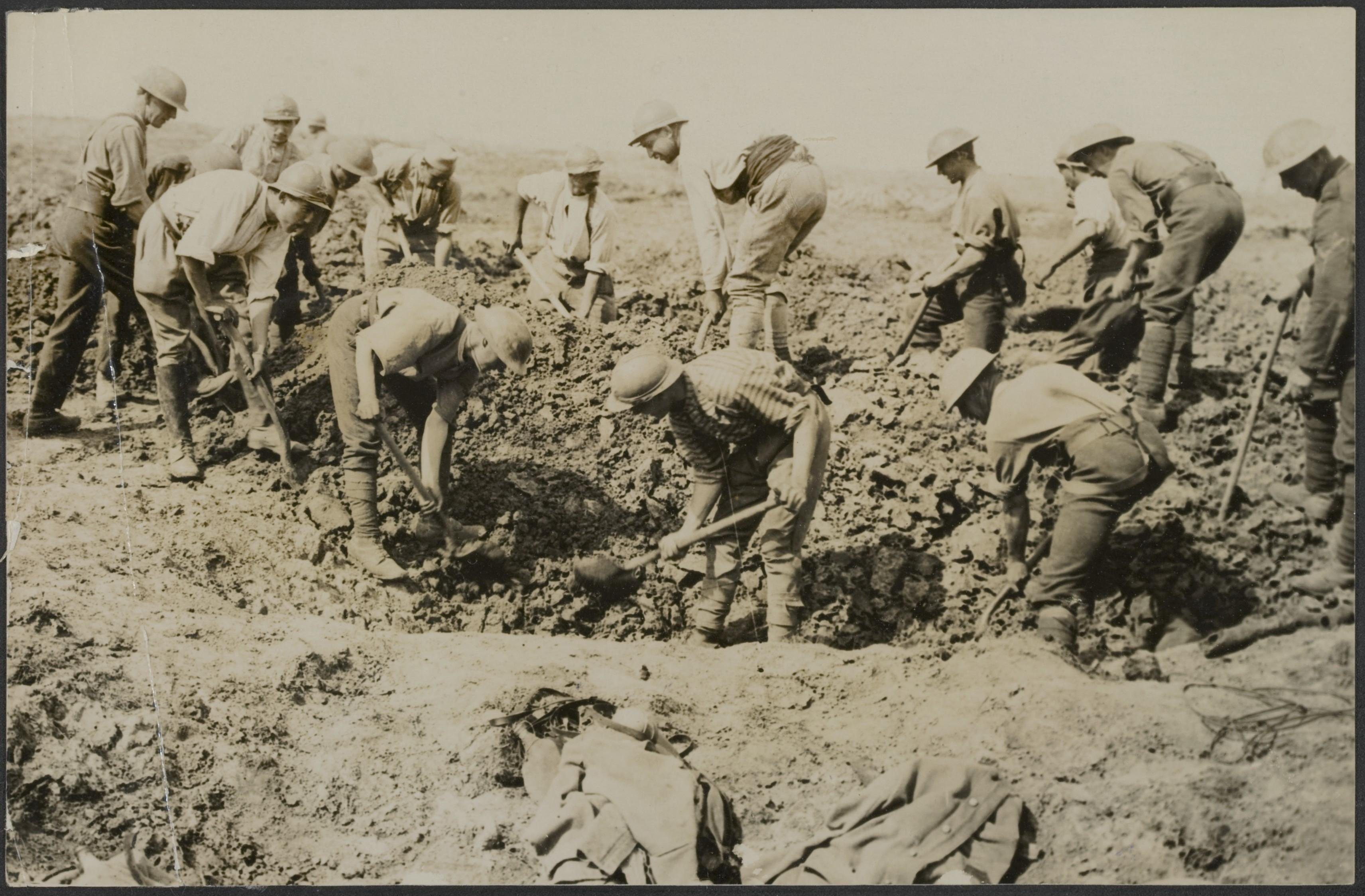 Collectie / Archief : Fotocollectie Eerste Wereldoorlog Reportage / Serie : The British Western front Beschrijving : Comrades-in-arms: British Tommies and French Poilus working side by side in the Battle of Flanders Annotatie : Het Britse Westelijk front. Wapenbroeders: Britse en Franse frontsoldaten werken zij aan zij in de Slag om Vlaanderen Datum : {1914-1918} Trefwoorden : eerste wereldoorlog, fronten, soldaten Fotograaf : LNA Auteursrechthebbende : Public Domain logo Materiaalsoort : Foto (zwart/wit) Nummer archiefinventaris : bekijk toegang 2.24.09 Bestanddeelnummer : 158-1762